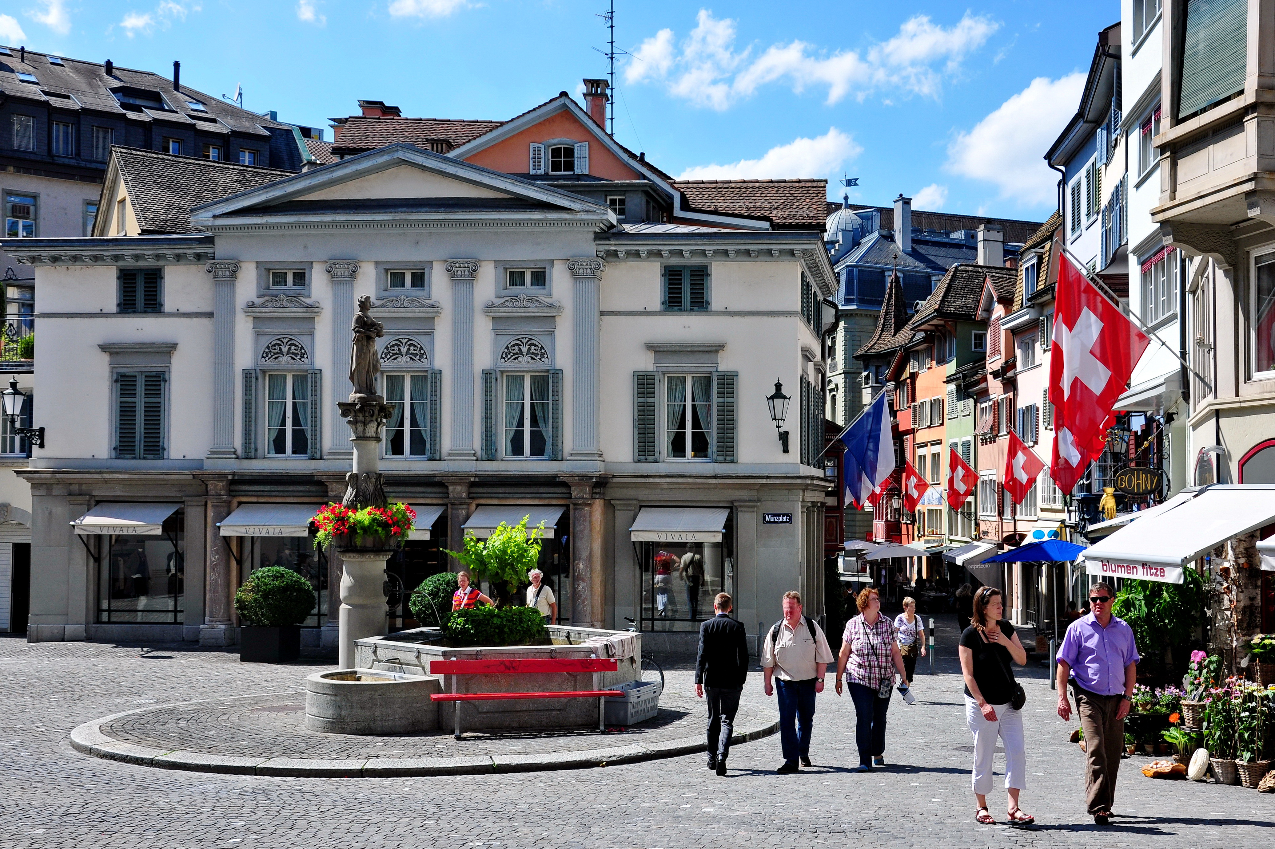 Münzplatz in Zürich-Lindenhof quarter (Switzerland), as seen from upper Augustinergasse